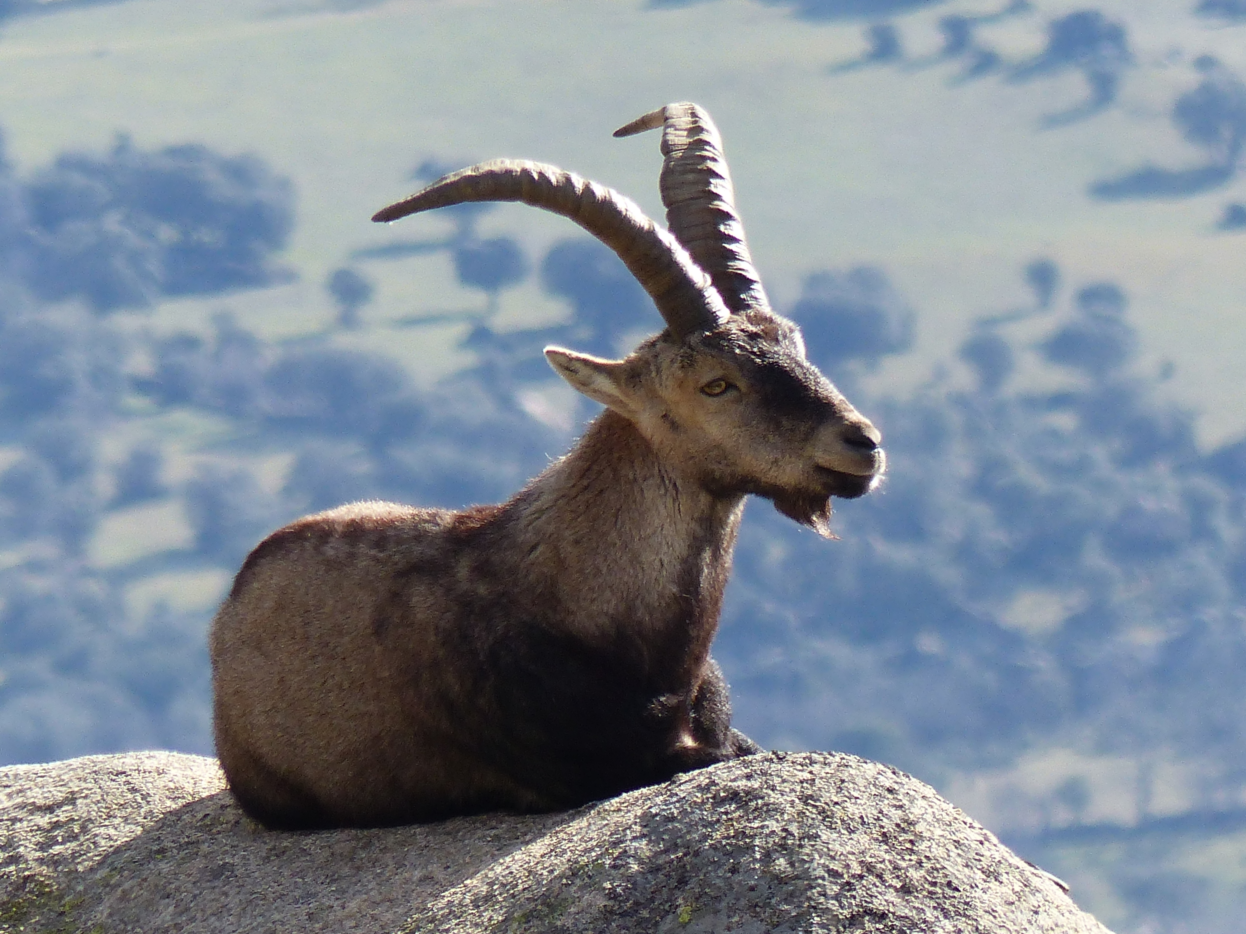 Macho de cabra montés (Capra pyrenaica victoriae) - La Pedriza (Sierra de Guadarrama).